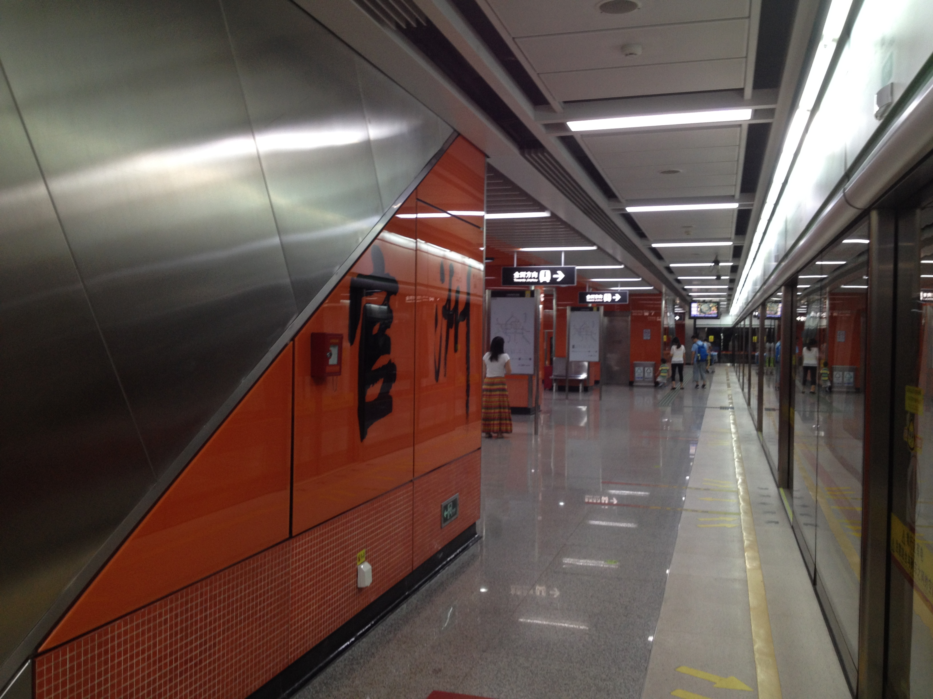 广州地铁官洲站月台